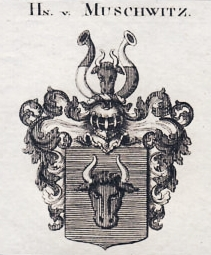 Wappen derer von Muschwitz